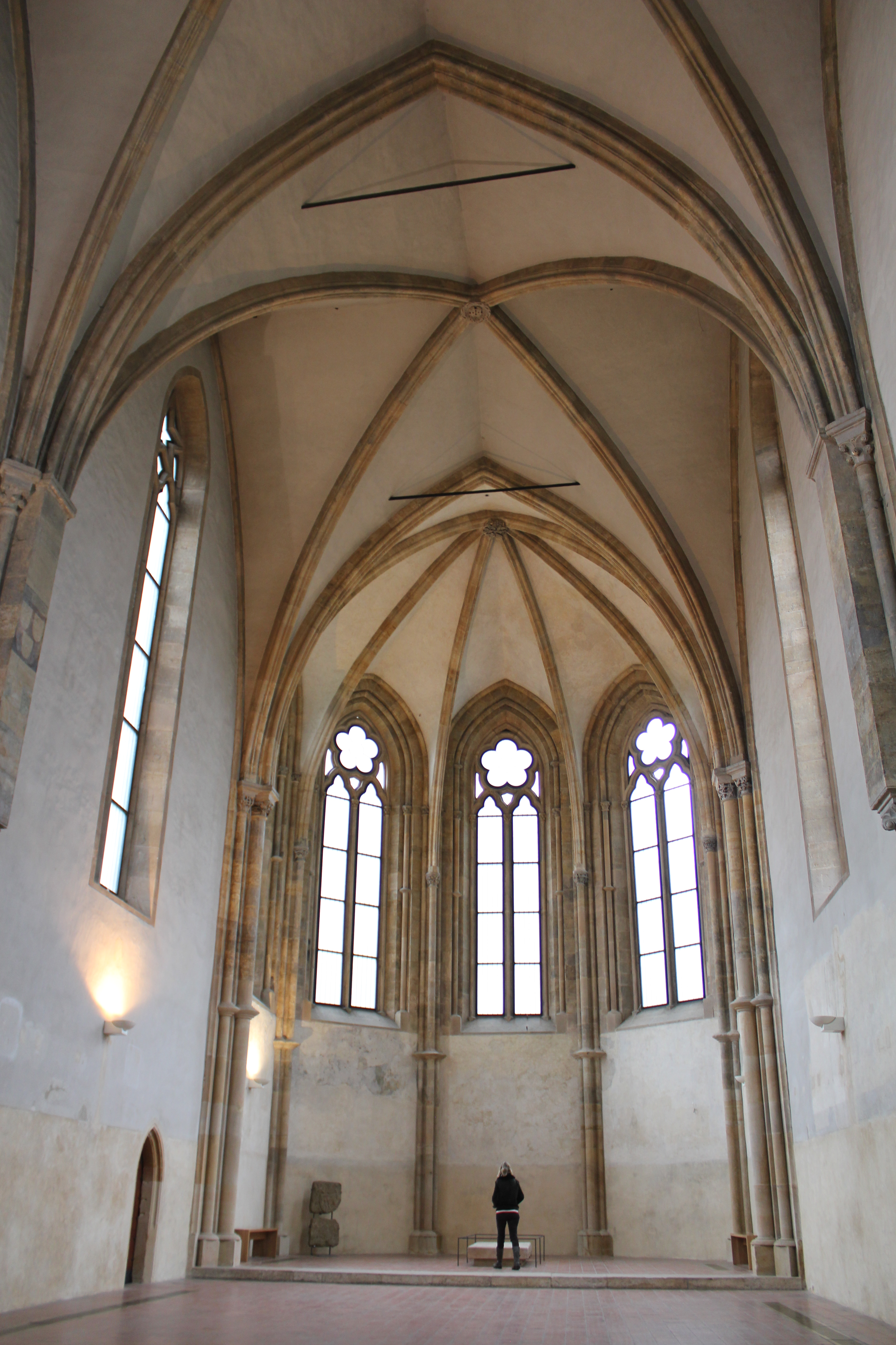 From St. Agnes of Bohemia monestary - av bøhmen klosteret - Klaster Sv. Anezky Ceske - Josefov - Den hellige frelsers kirke